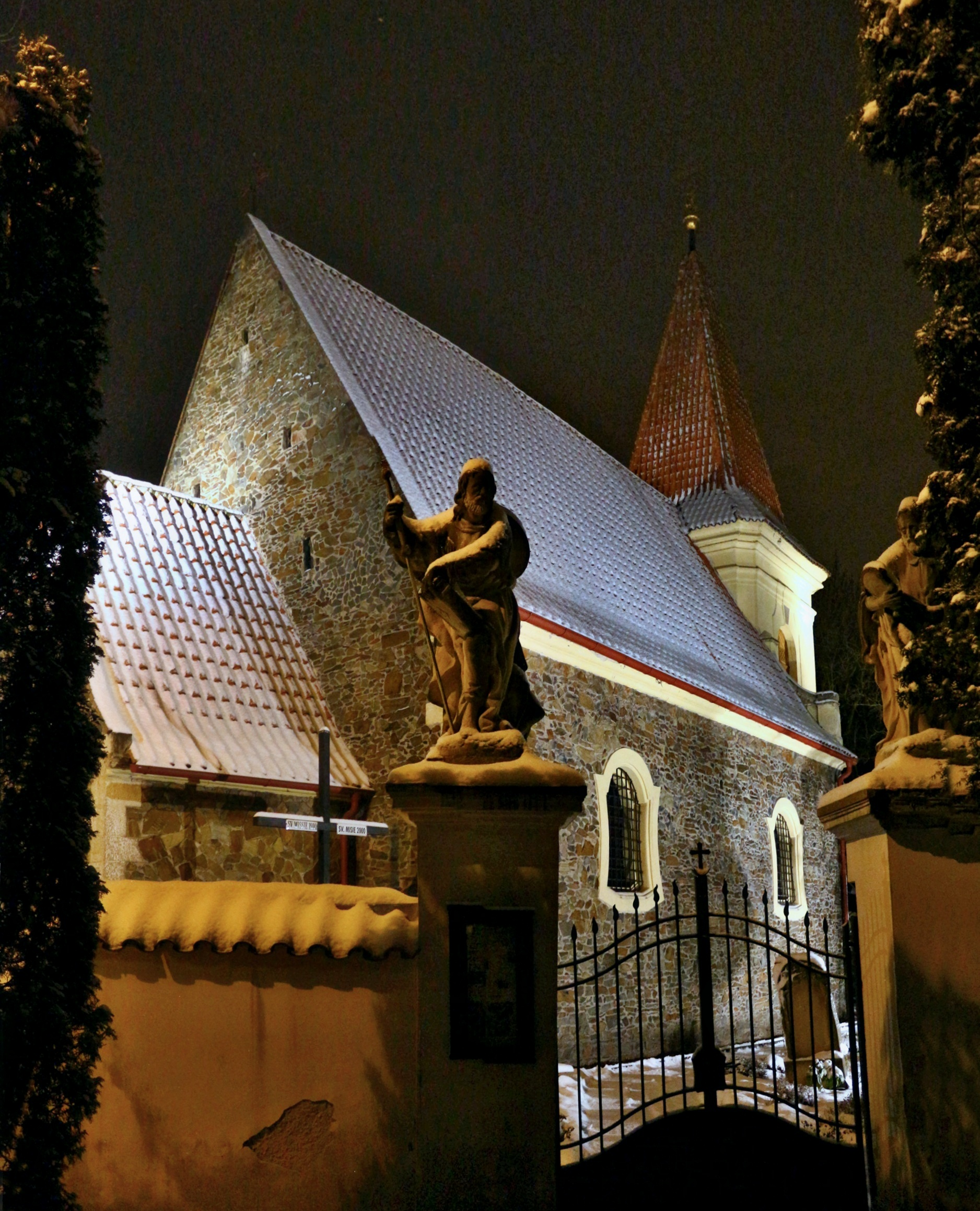 Praha 10-Petrovice, kostel svatého Jakuba Staršího